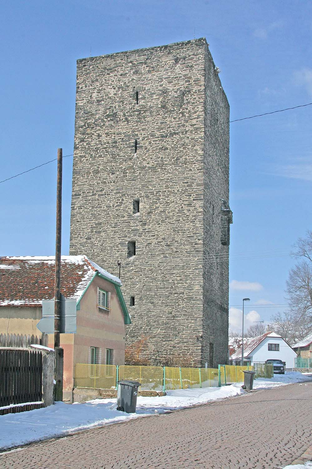 Tvrz v Semtěši, District Kutná Hora autor:Prazak date: 13. 3. 2006